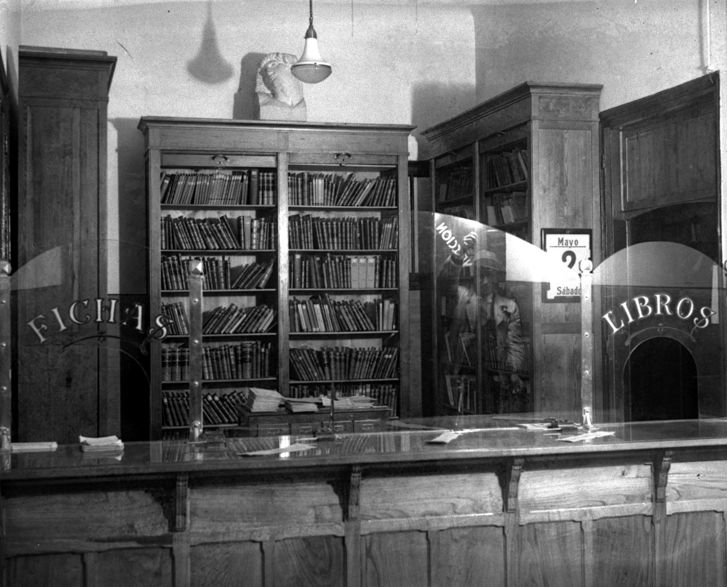 Biblioteca Circulante del Ateneo Obrero de Gijón. 1934 (Constantino Suárez. Muséu del Pueblu d'Asturies)